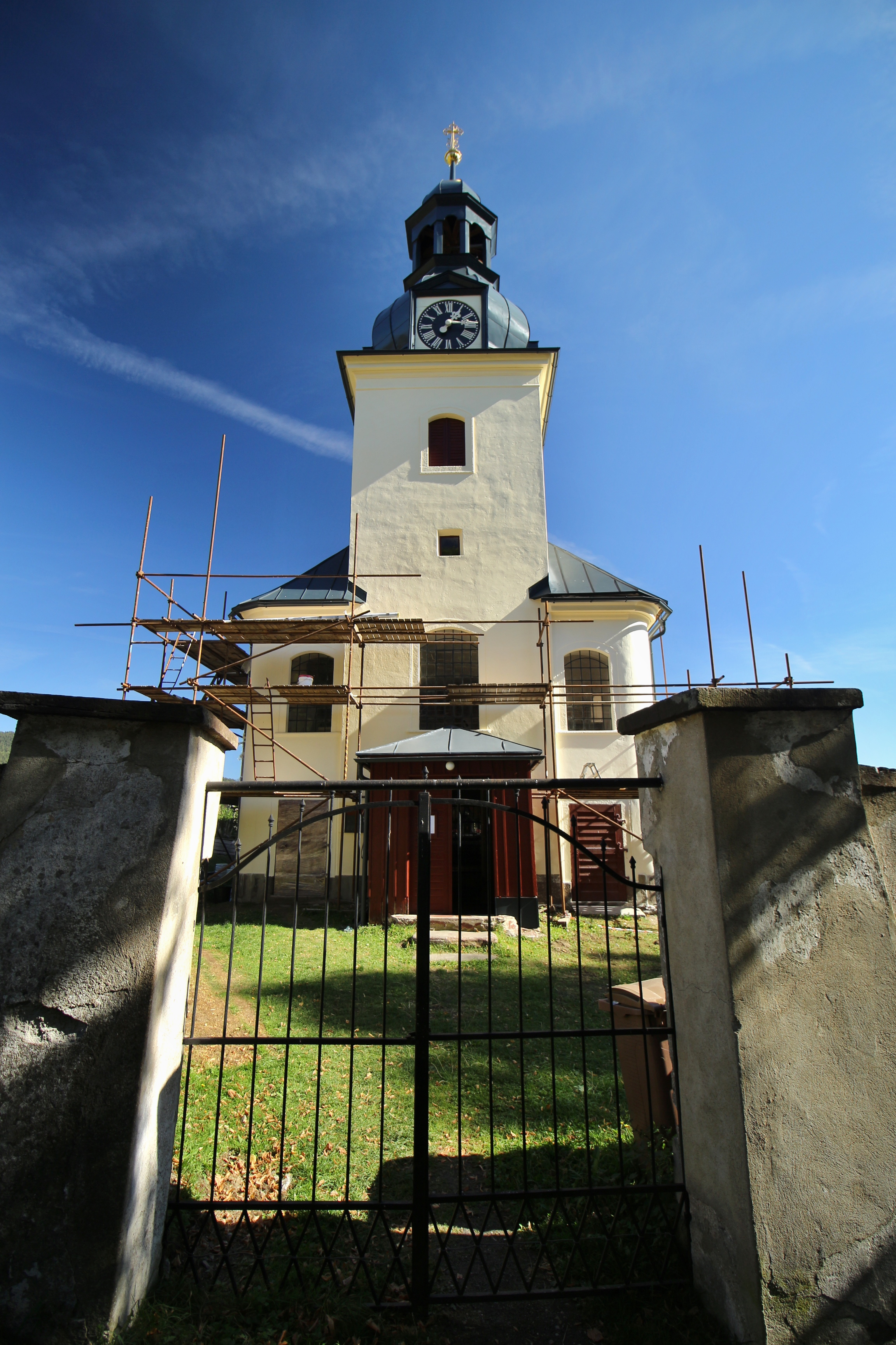 Kostel svatých Petra a Pavla ve Vítkovicích v Krkonoších